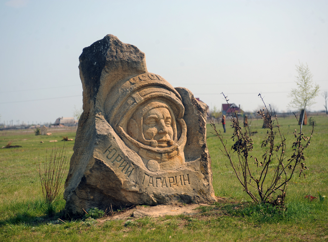 Памятник Юрию Гагарину в Дружковке, Донецкая область